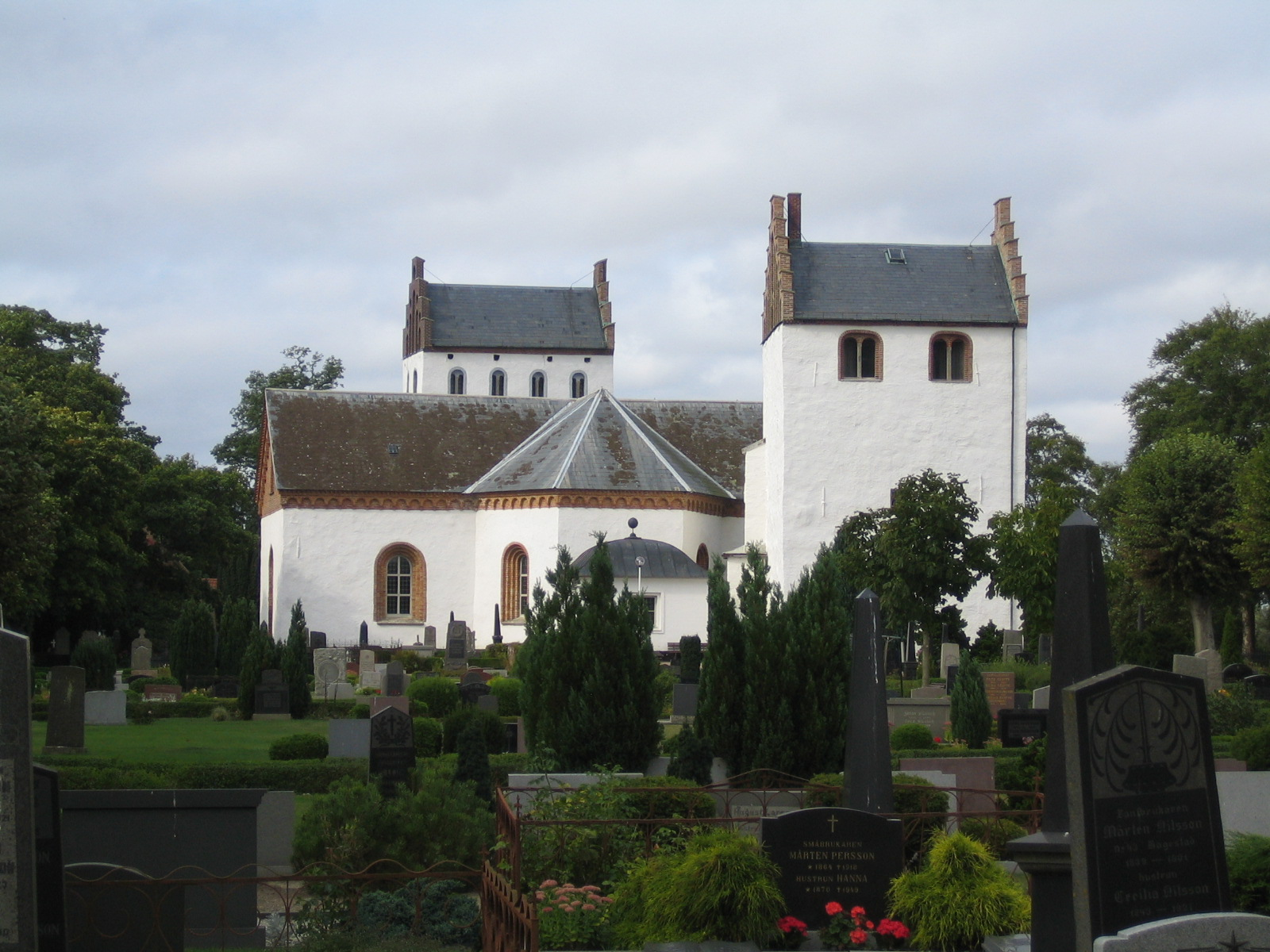 Löderups kyrka